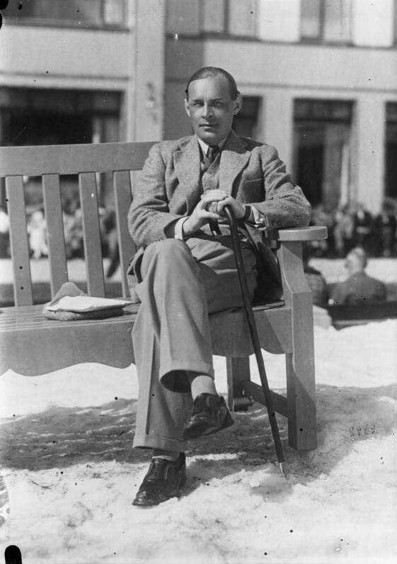 Demonstrationsverbot in Berlin! Infolge der Ruhestörungen durch die Aufführung des Remarque-Films "Im Westen nichts Neues" ist ein Demonstrationsverbot für Berlin erlassen worden. Die Polizei sicherte die Strassen und Plätze im Berliner Westen mit Wasserwerfern und grossem Polizeiaufgebot. Der durch das Buch "Im Westen nichts Neues" bekannte Schriftsteller Erich Maria Remarque, dessen Film in Berlin zu grossen Unruhen führte, während einer Erholung in Davos/Schweiz.